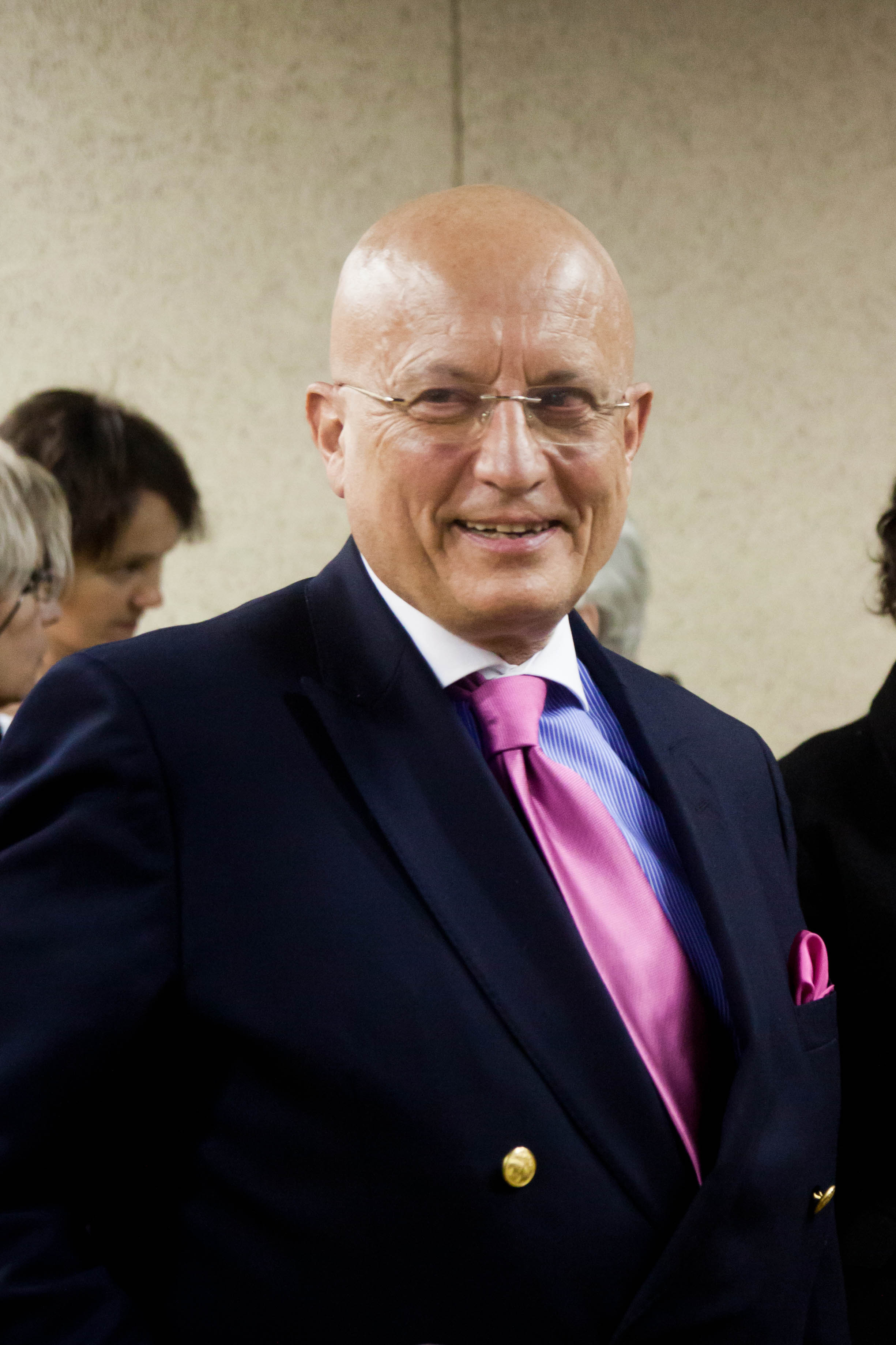 Экскурсия, концерт и фуршет в Музее истории ГУЛАГа 12 декабря 2017 года